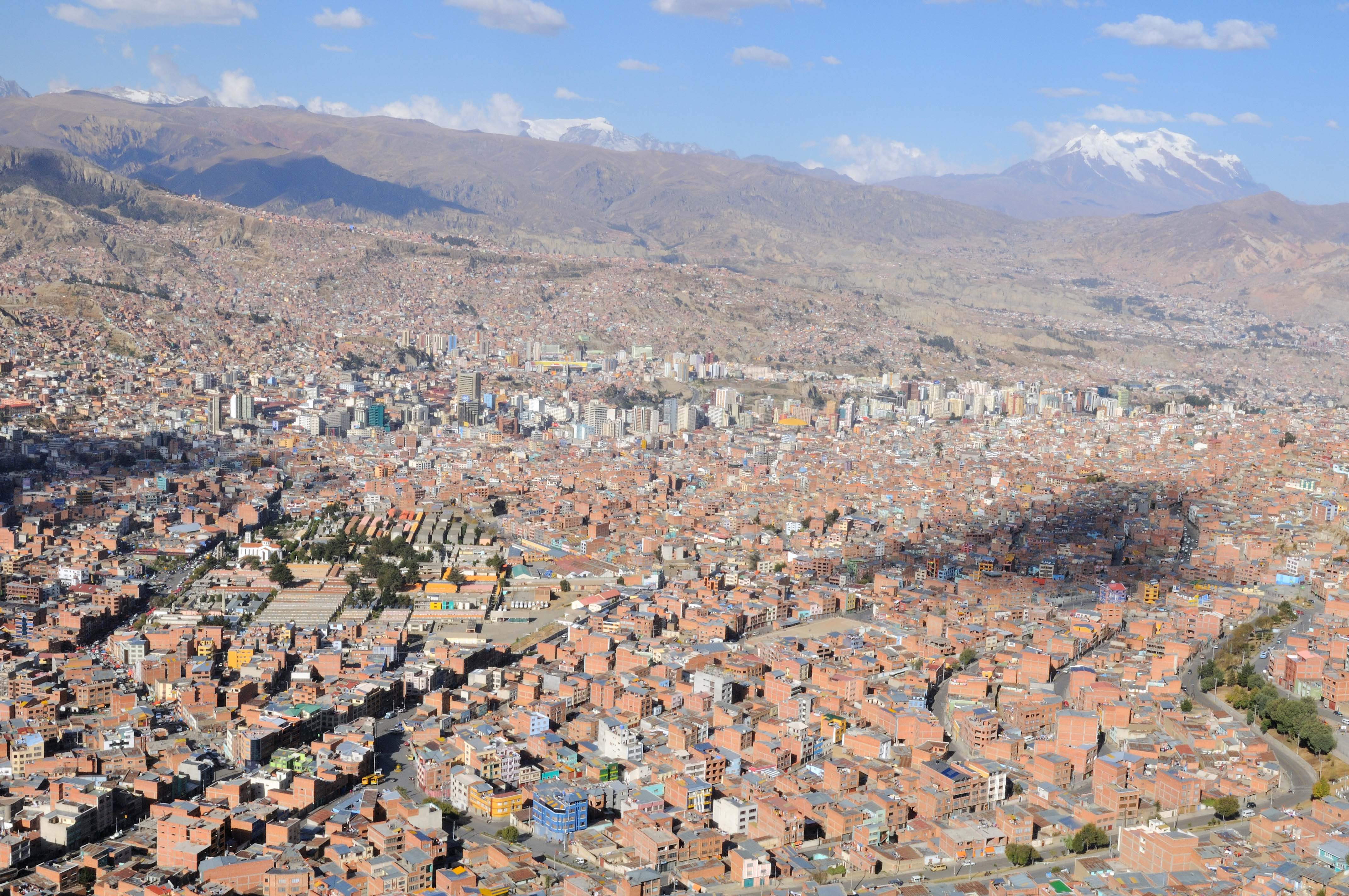 La Paz, Bolivia